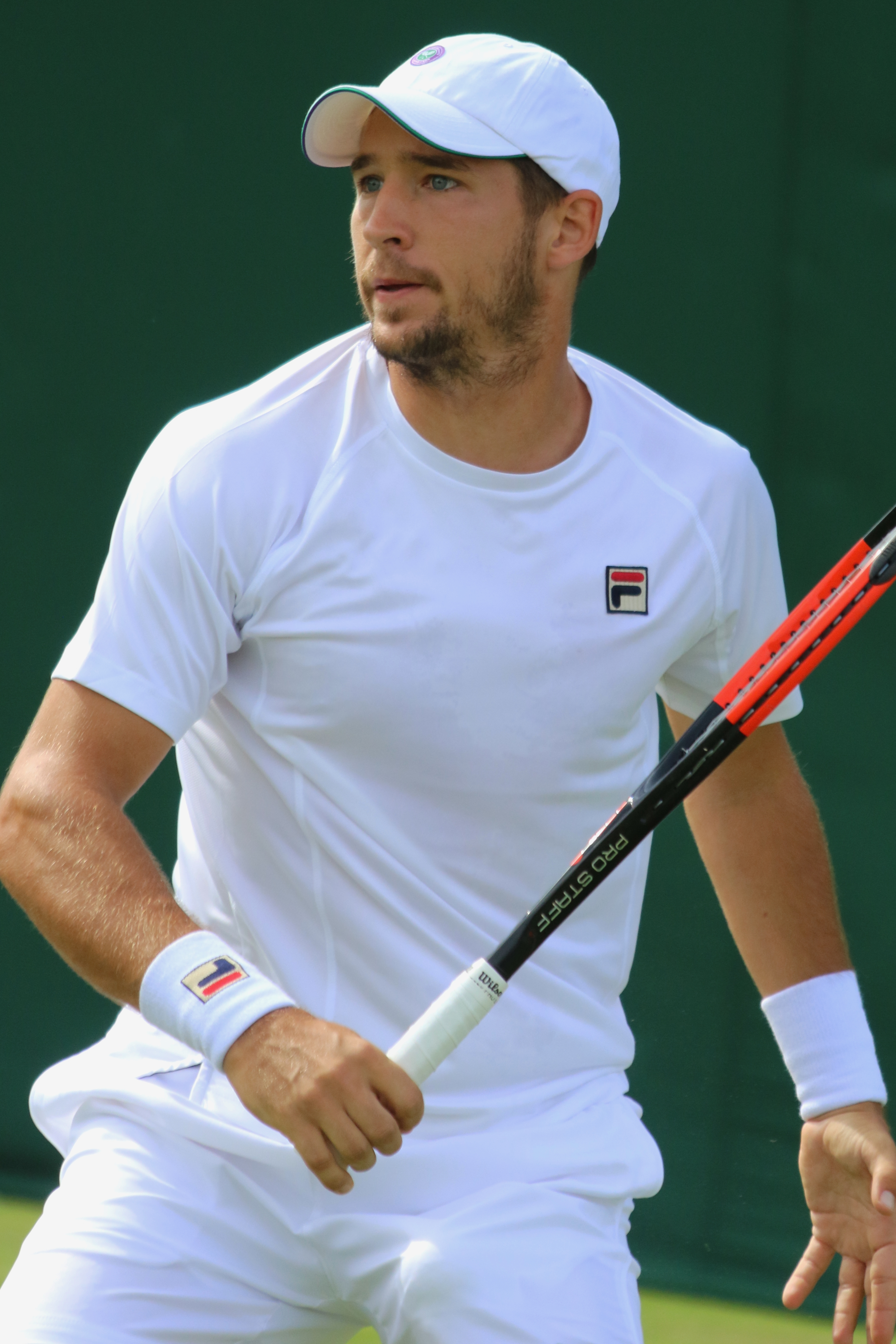 Lajovic WM17 (9)